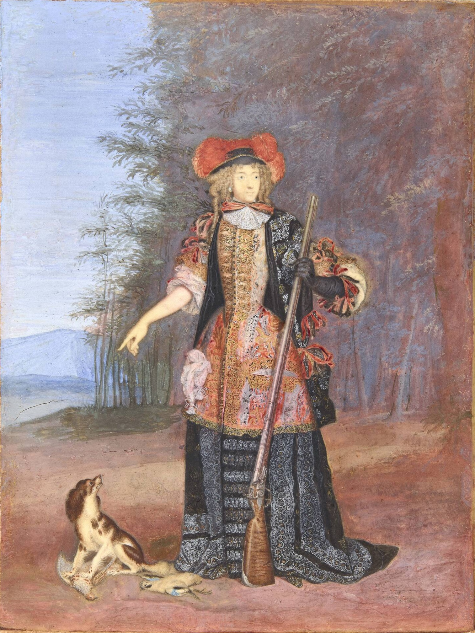 Gouache sur parchemin collé sur bois - 17,3 x 13,2 cm Versailles, Musée national du château Photo : RMN-GP/C. Fouin